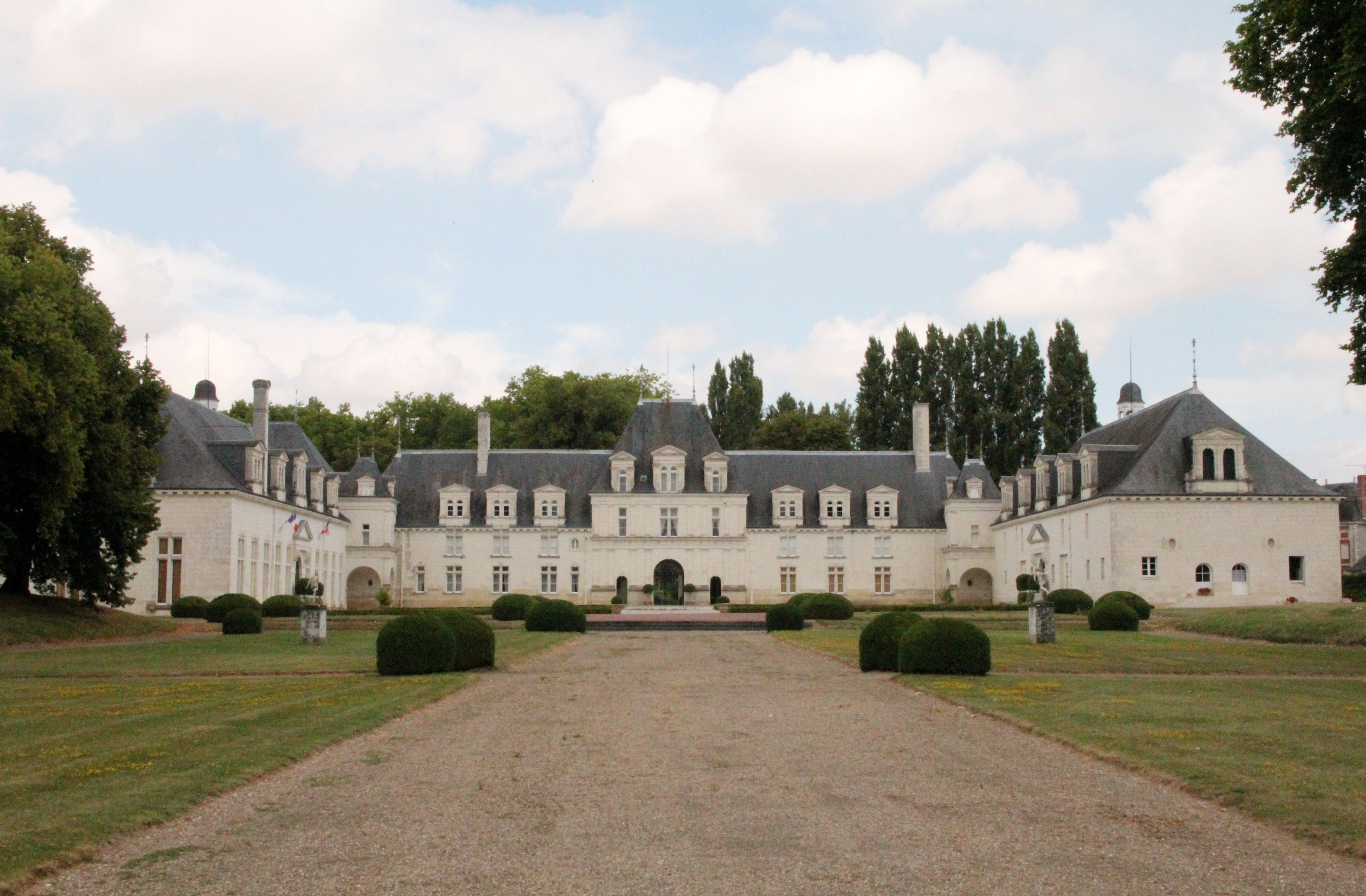 Château ancienne dépendance